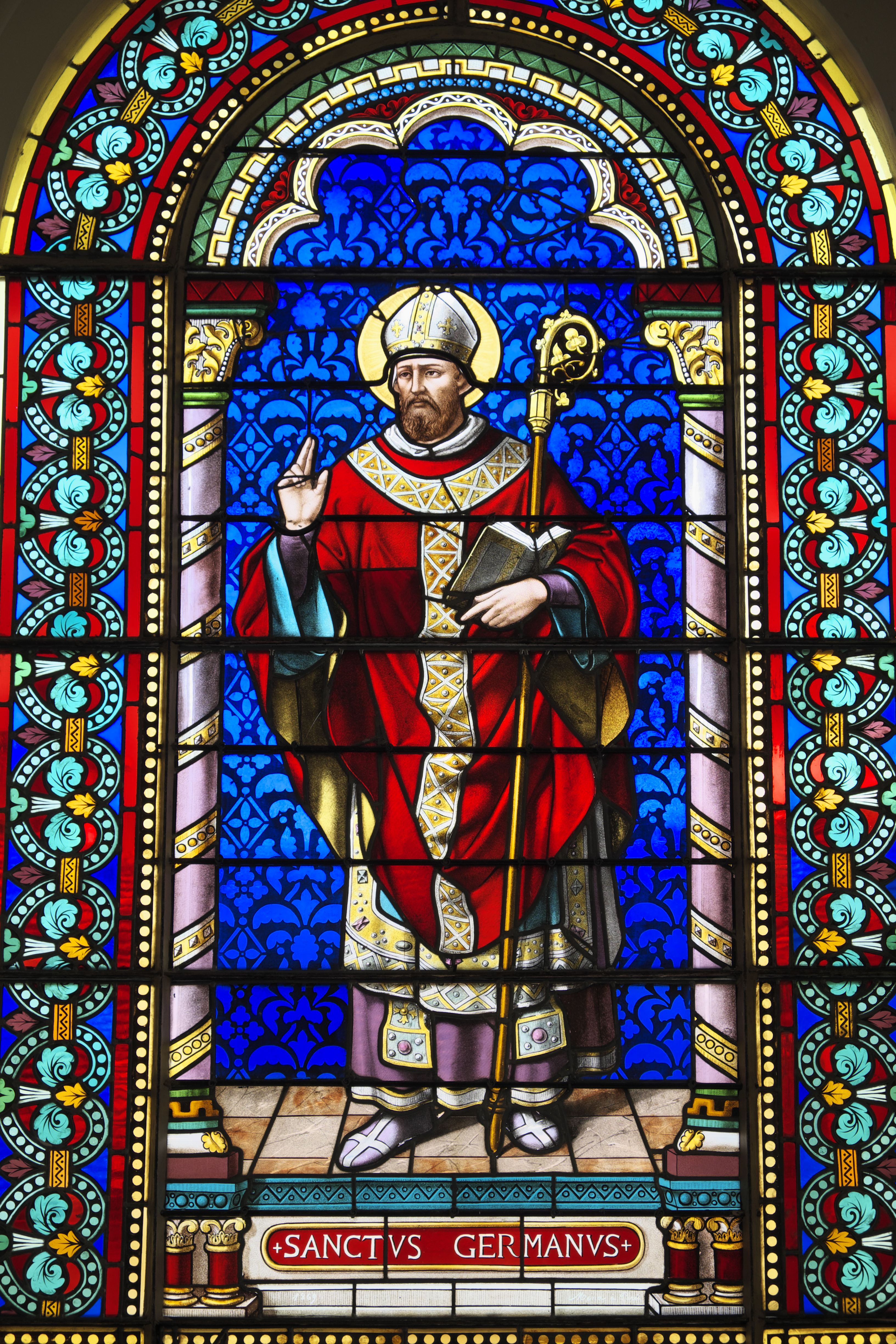 Katholische Pfarrkirche Saint-Germain-de-Paris in Hardricourt im Département Yvelines (Île-de-France/Frankreich), Bleiglasfenster mit der Signatur: 1869 Ména à Paris; Darstellung: Germanus von Paris